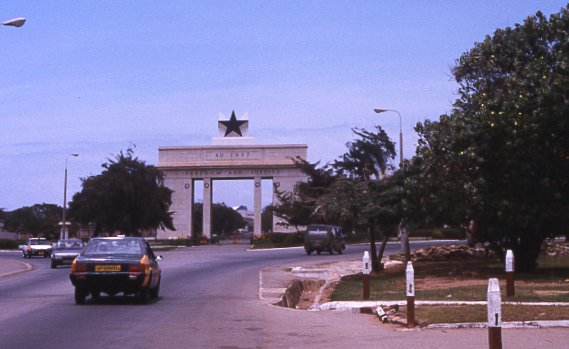 Nepriklausomybės arka Akroje :de:Bild:Independence-arch.jpg